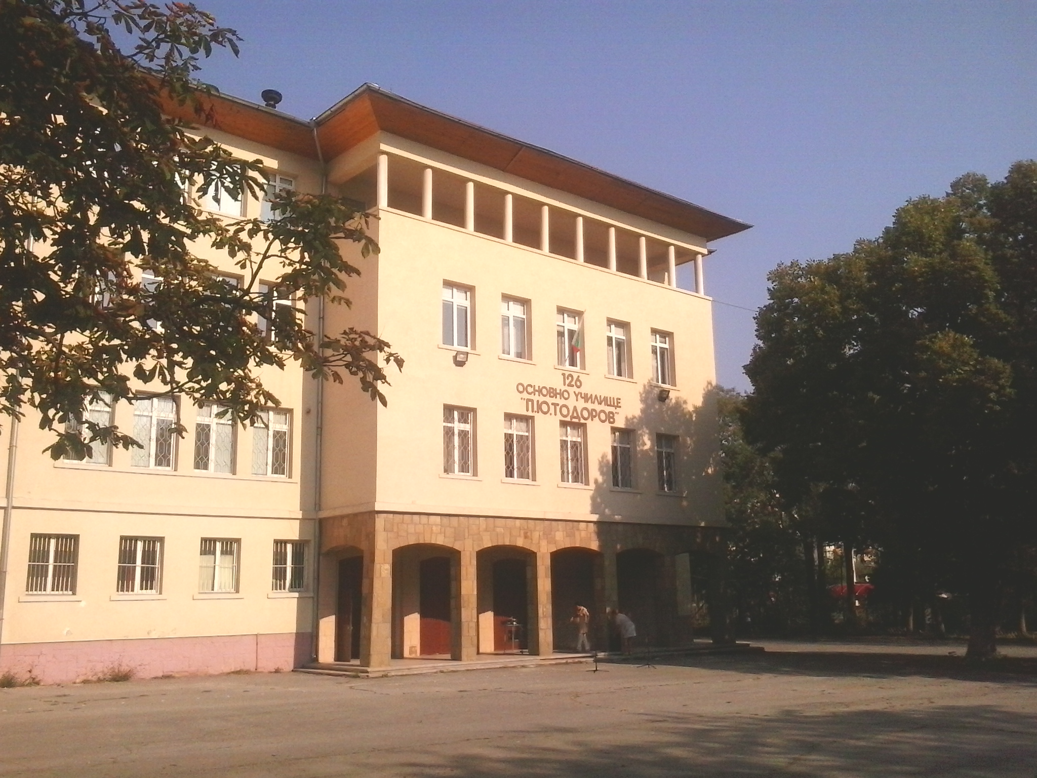 126 основно училище "Петко Тодоров" в София